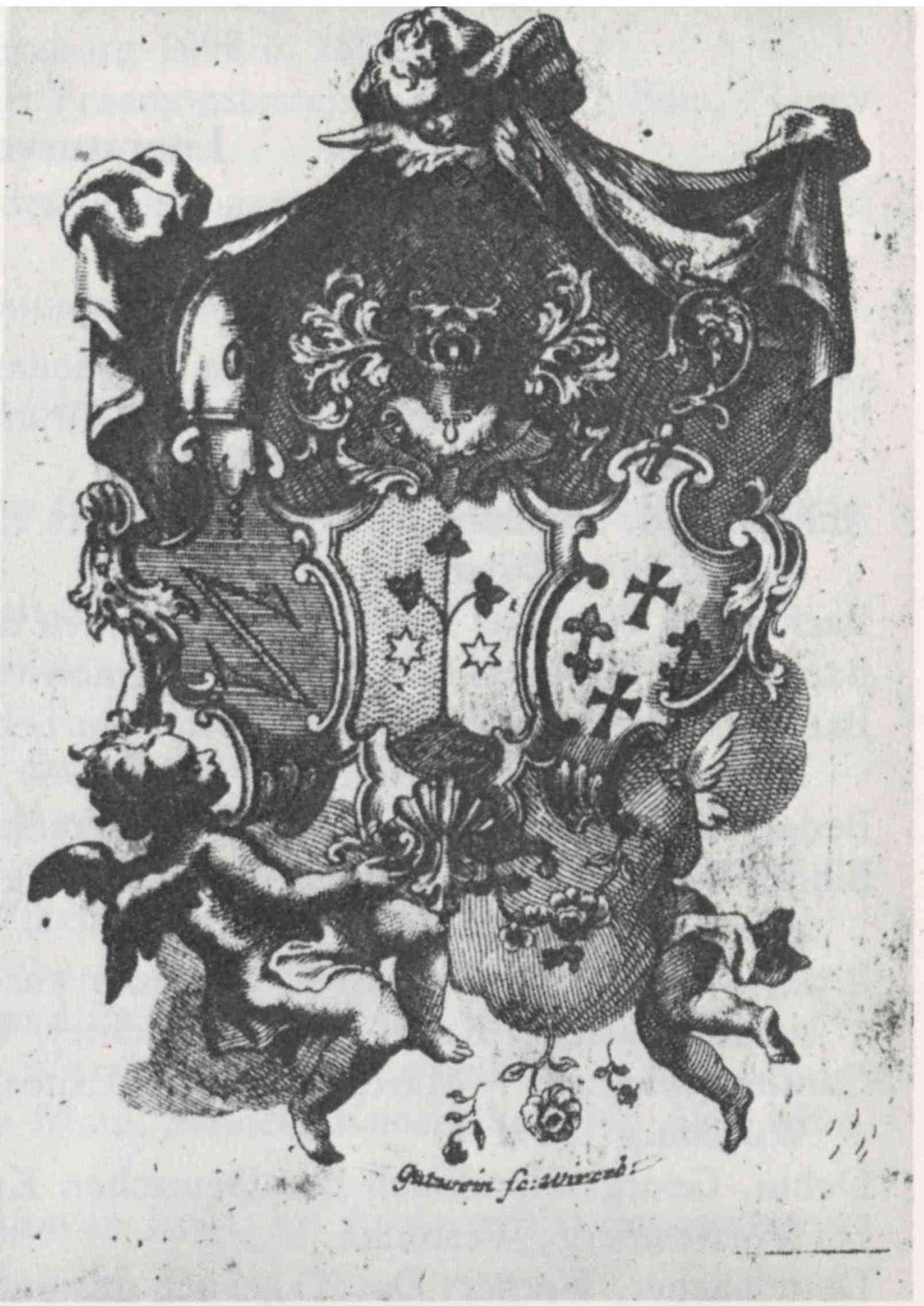 Wappen Georg Fasel (1675-1747), Abt von Kloster Oberzell (1738-1747)